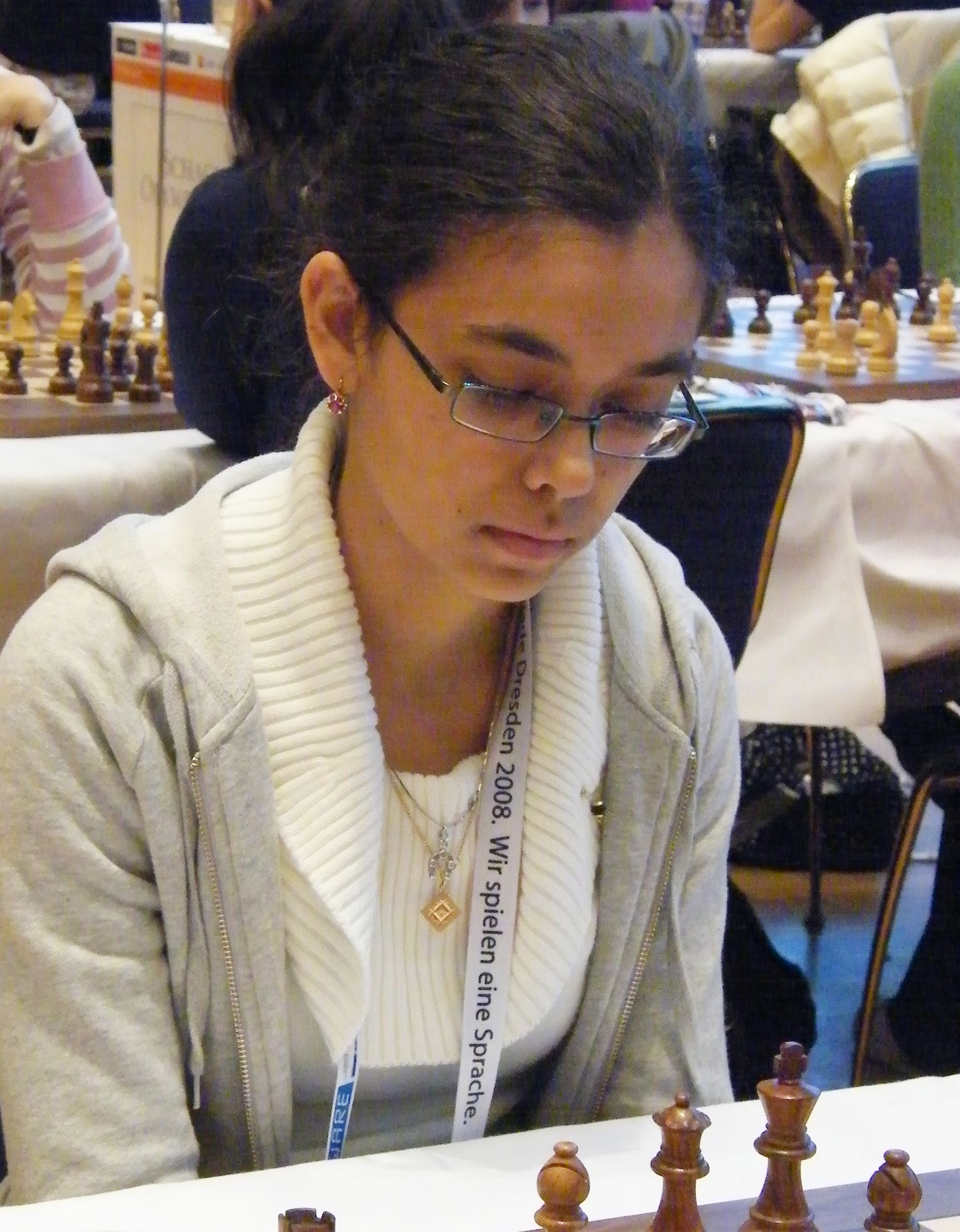 WCM Victoria Naipal bei der 38. Schacholympiade in Dresden 2008